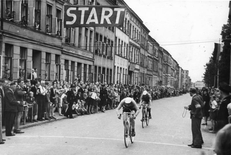 Rostock, Radrennen "Quer durch die Ostzone" Illus/Pietsch Am 10. September 1949 begann in Berlin das Radrennen "Quer durch die Ostzone". Die 1200 km lange Strecke ist in sieben Etappen eingeteilt und wird von Berlin nach Rostock, Wittenberge, Magdeburg, Erfurt, Chemnitz, Leipzig zurück nach Berlin gehen. U.B.z.: Start zur zweiten Etappe der Ostzonen-Rundfahrt Rostock-Wittenberge 3927-49